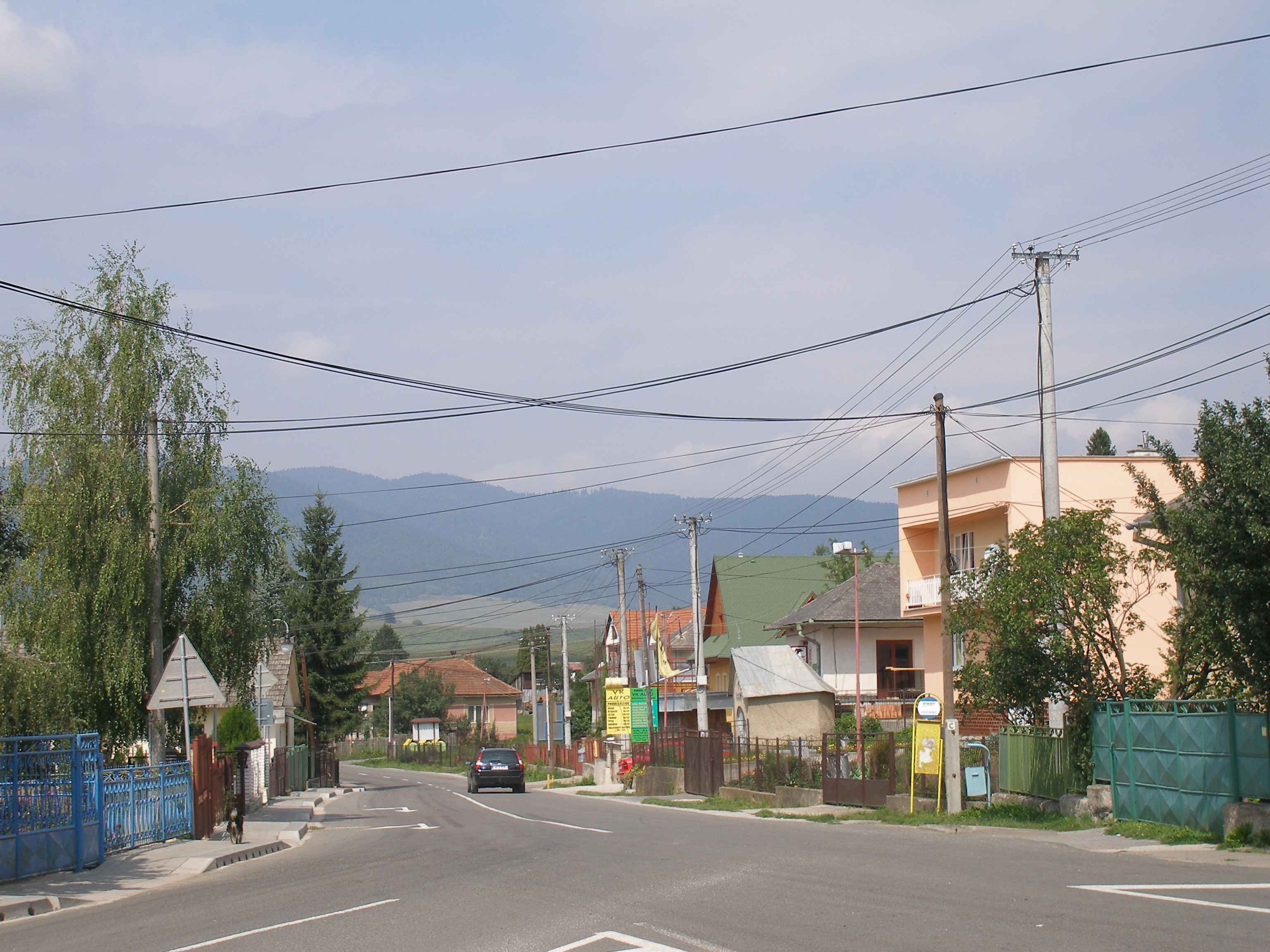 Šarišská obec Víťaz